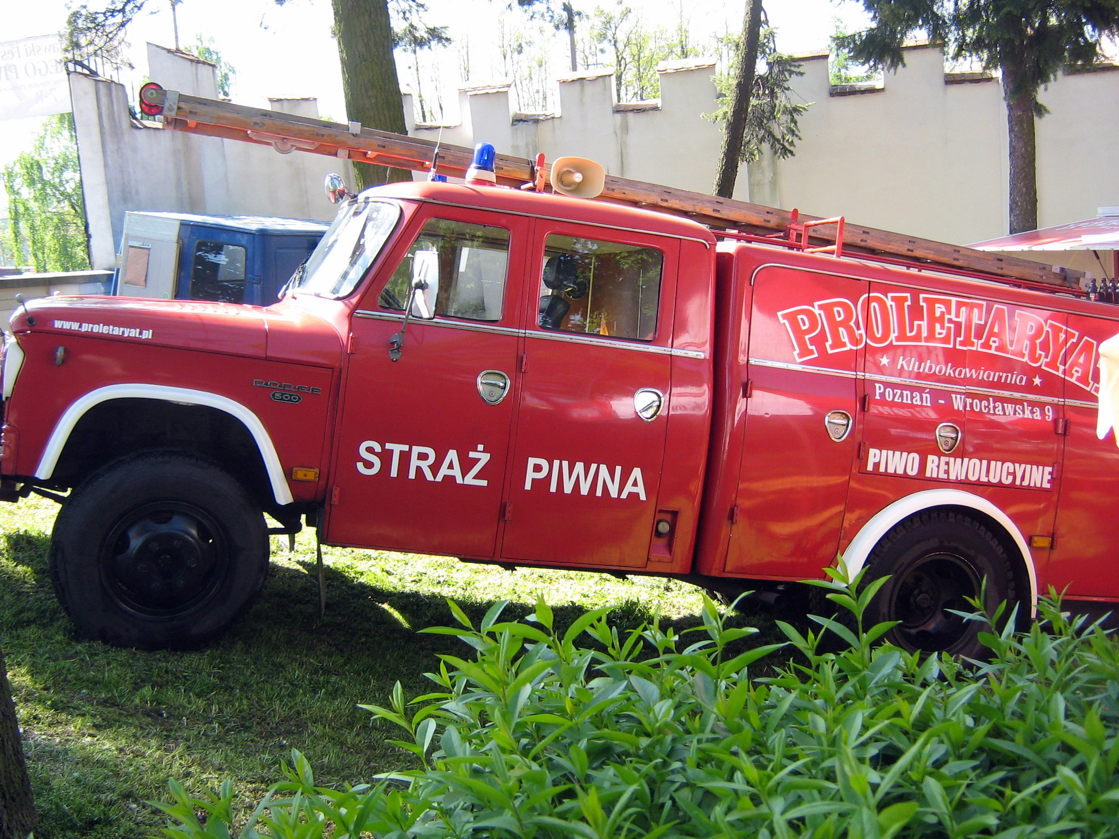 Auto reklamowe na Festiwalu Dobrego Piwa 2011